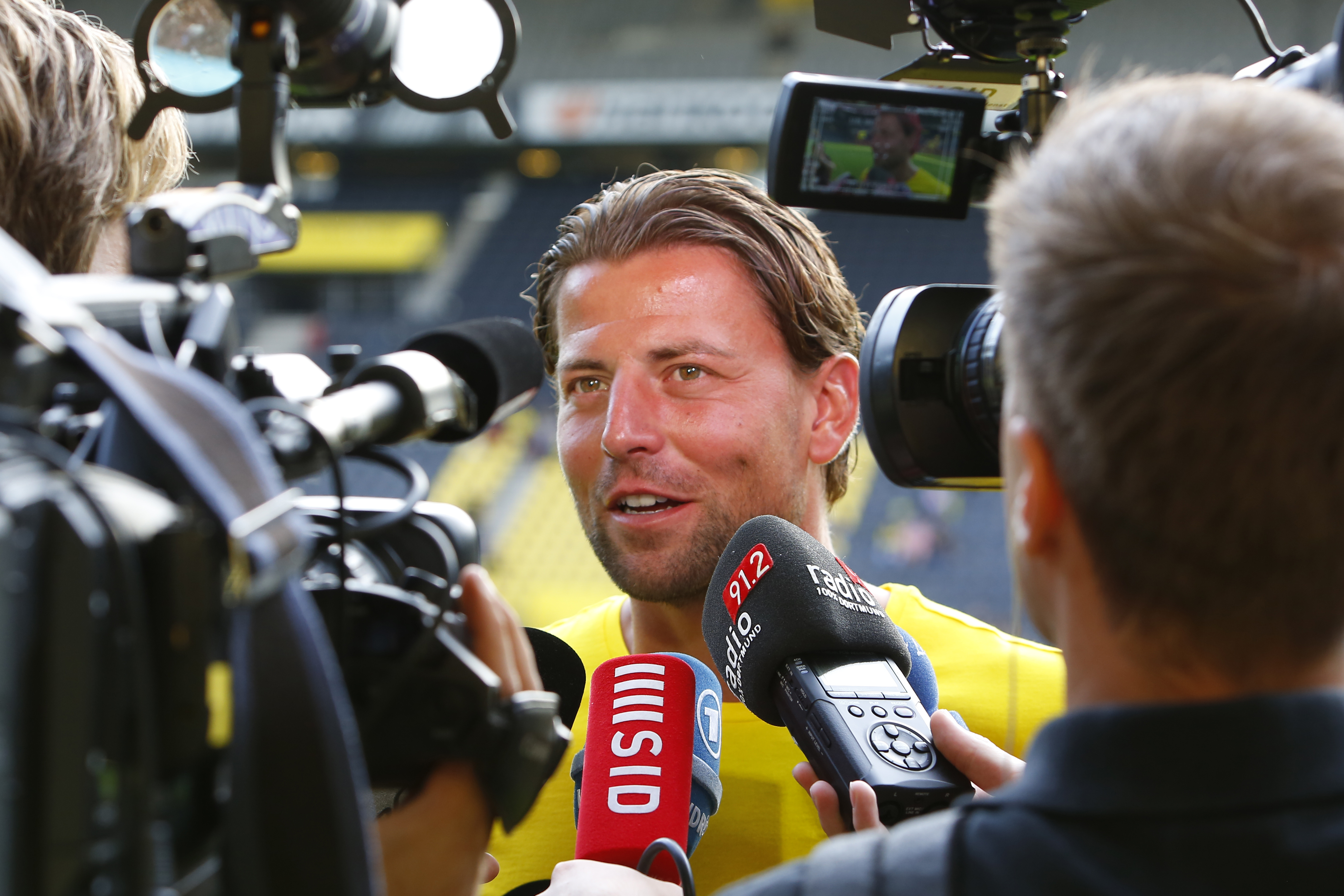 Roman Weidenfeller, Torwart bei Borussia Dortmund, bei der Saison-Eröffnung am 09.08.2014 im Signal Iduna Park in Dortmund